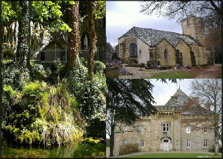 Photo montage réunissant les sites notables de la commune.